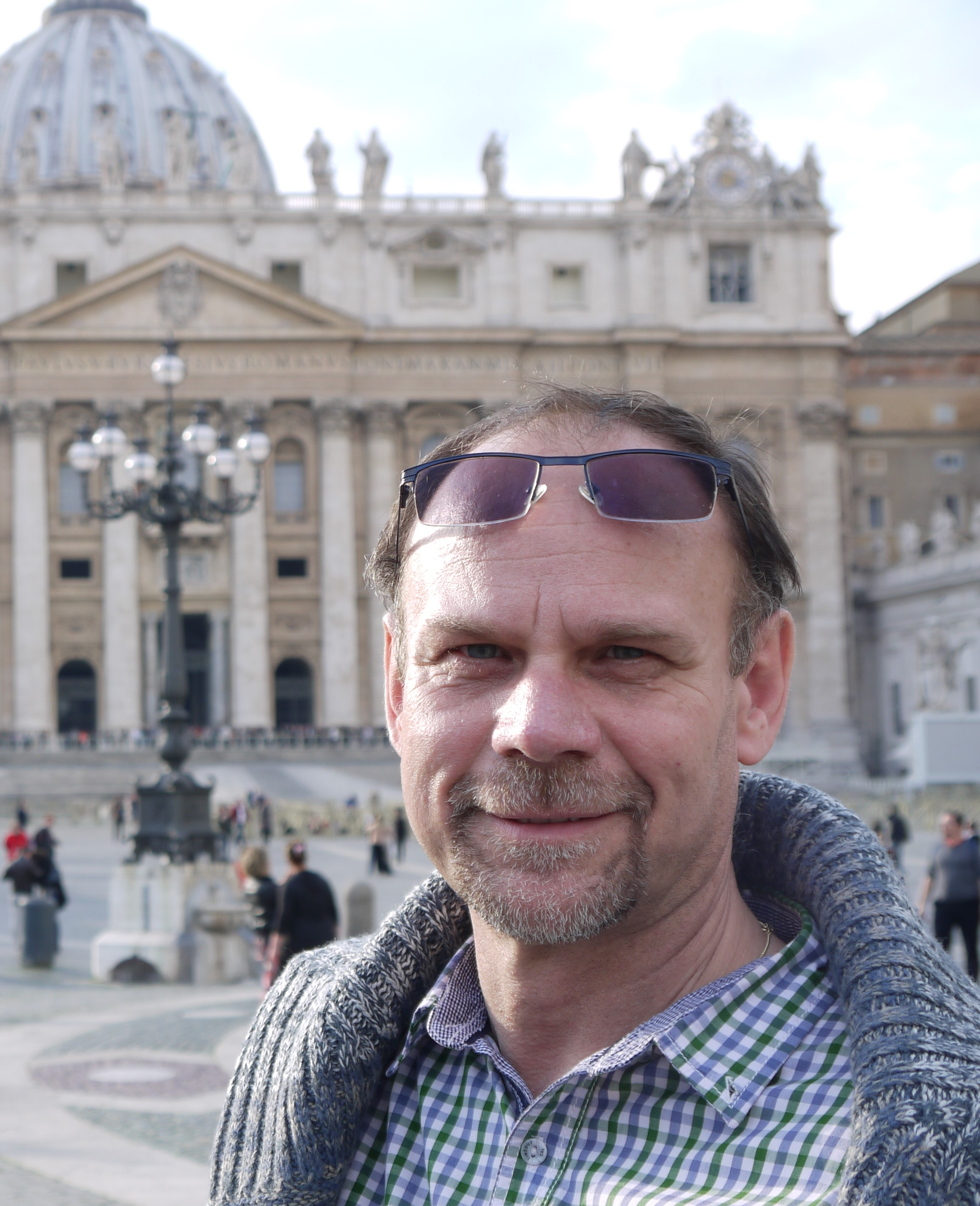 Miloš Szabo v Římě na Nám. sv. Petra